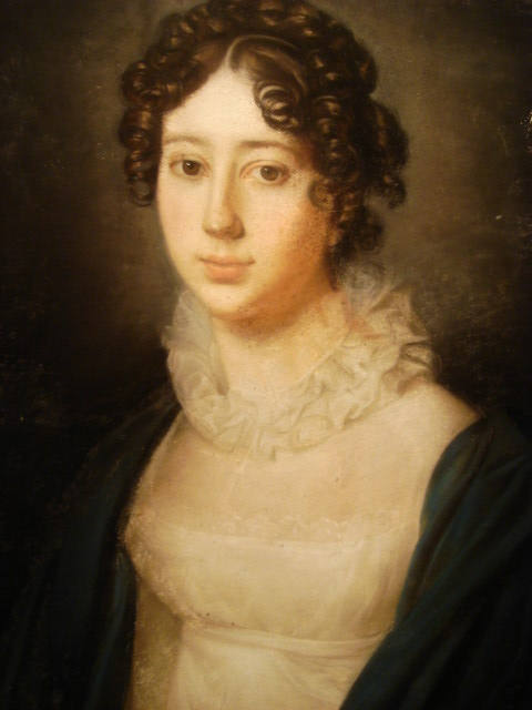 Графиня Екатерина Михайловна Рибопьер (1788-1872), ур. Потёмкина